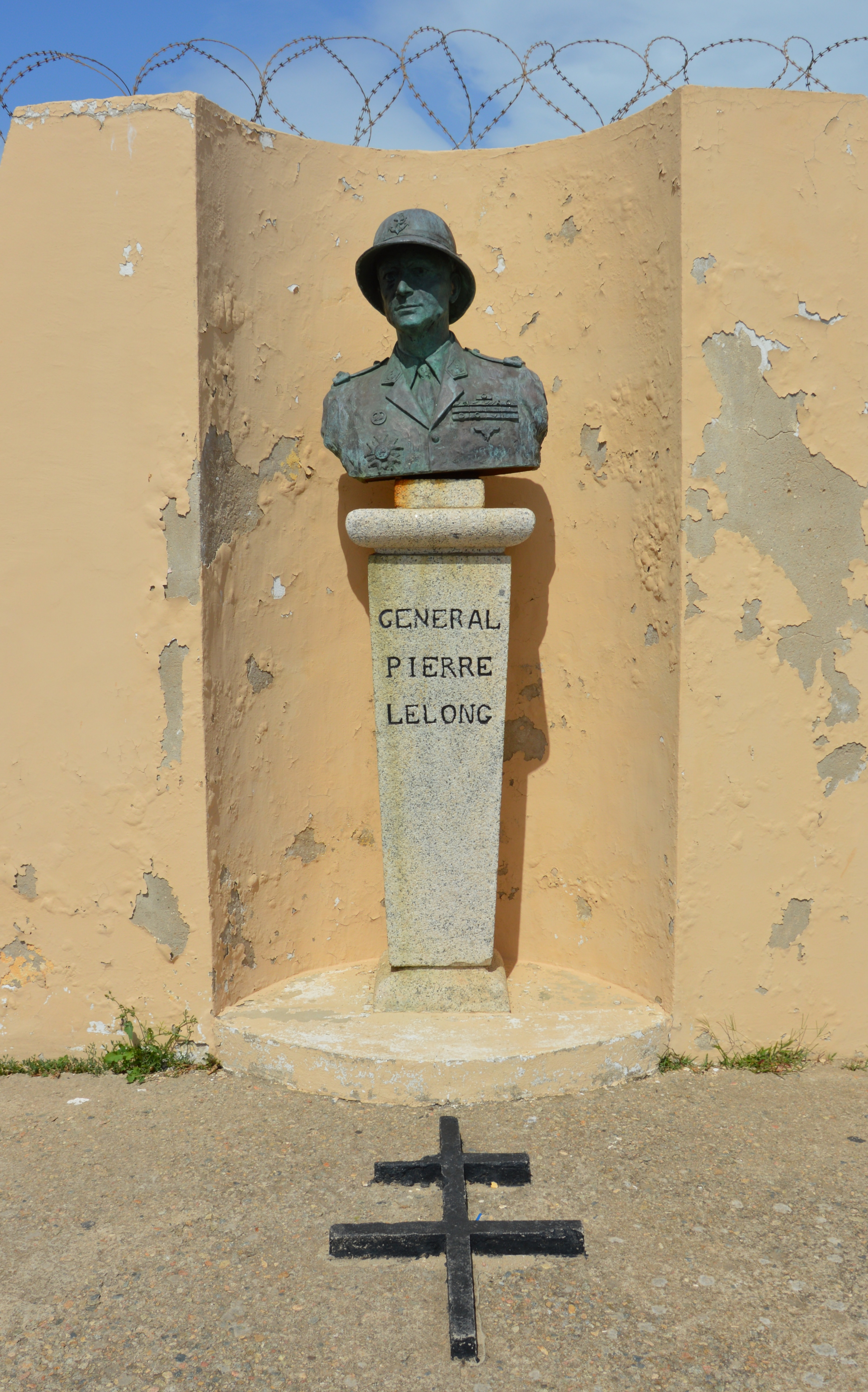 Lelong-Denkmal 2018